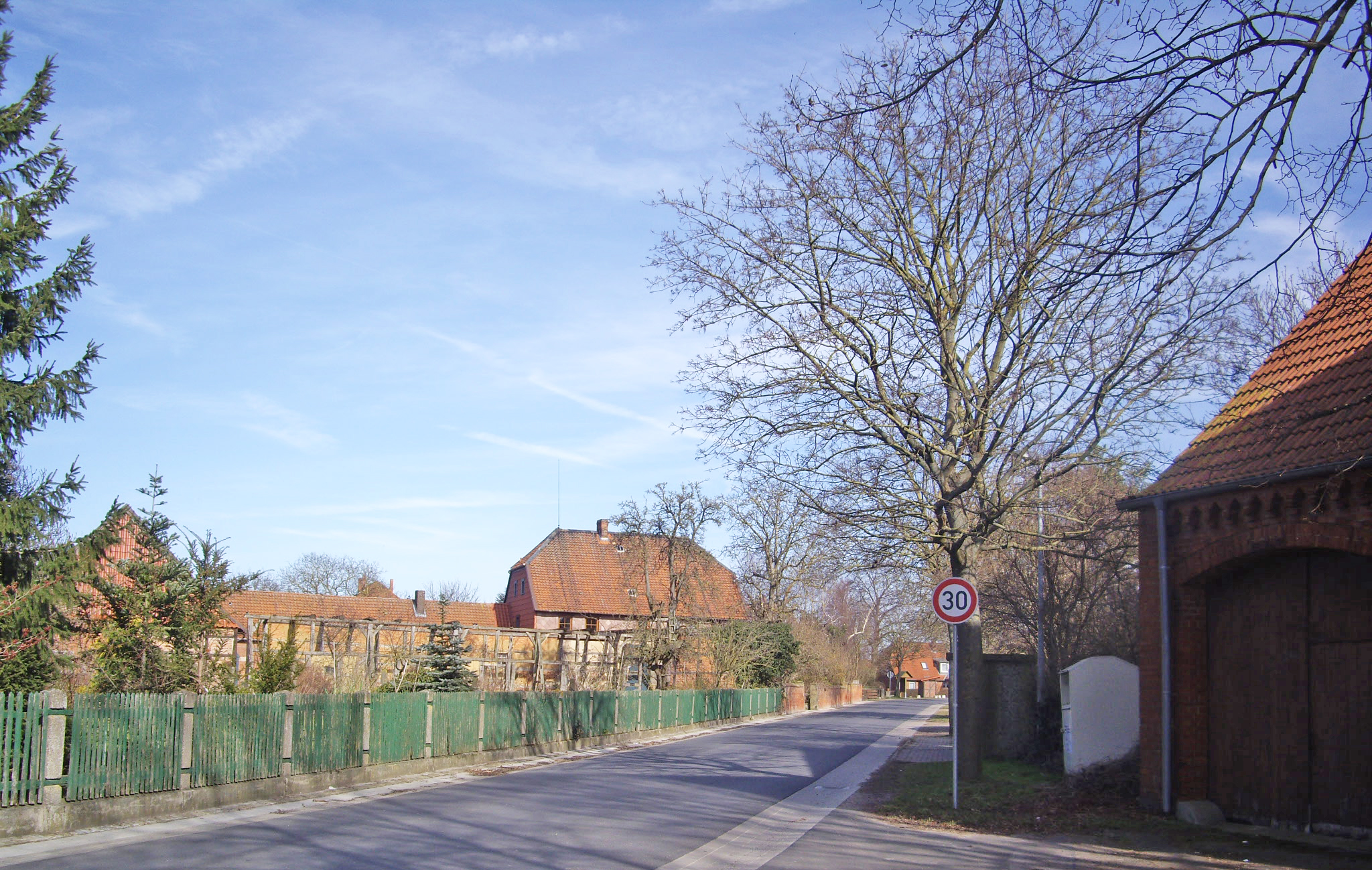 Oerie, Dorfmitte, Blick nach Osten. Foto: F. Welter-Schultes